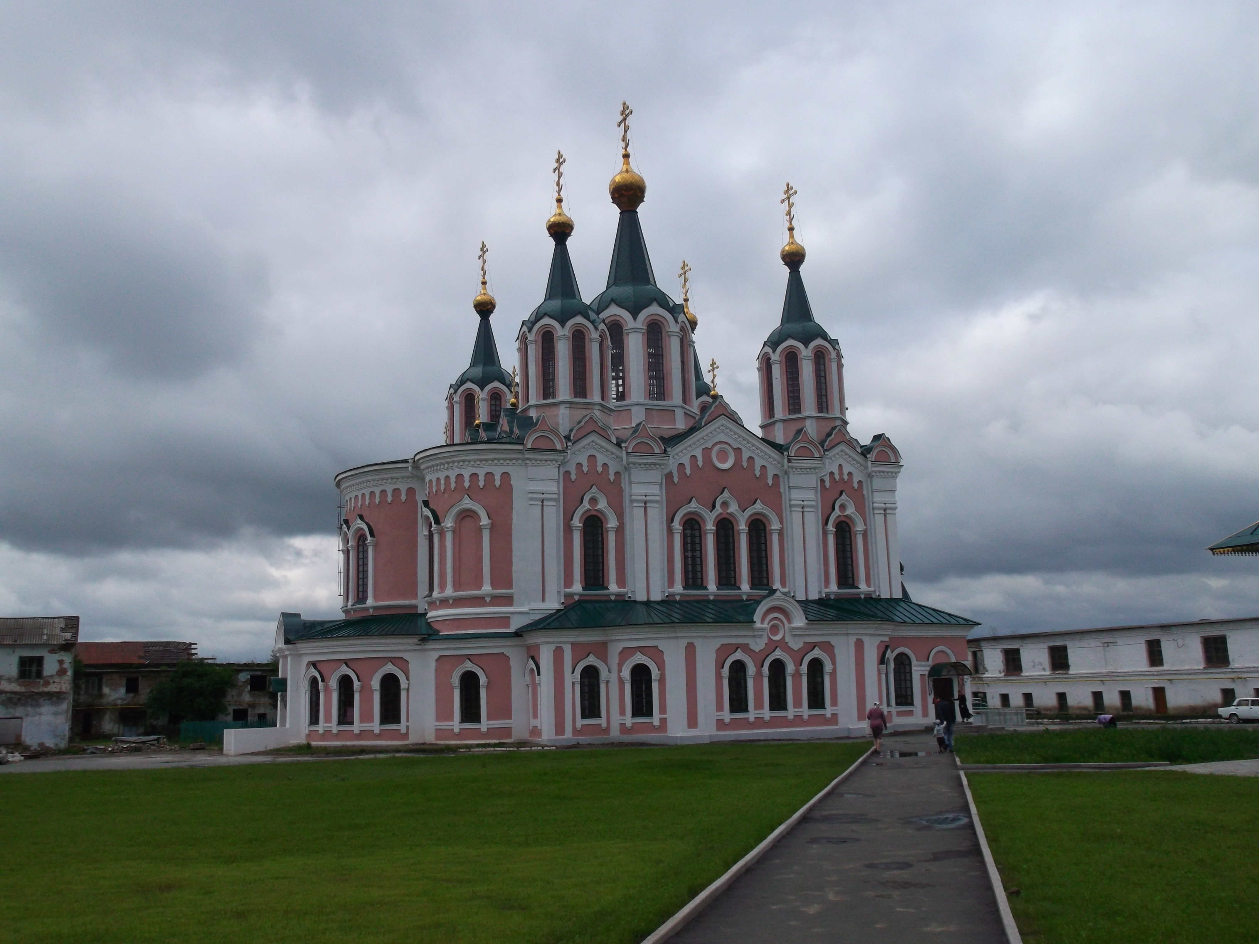 г. Далматово